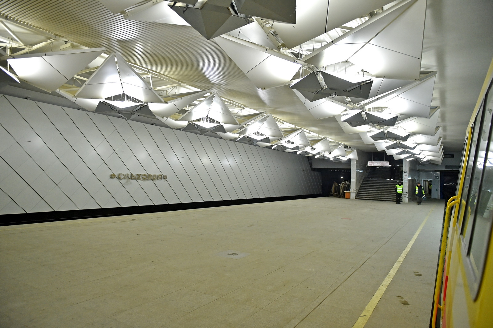 Станция метро «Ольховая» во время технического пуска.